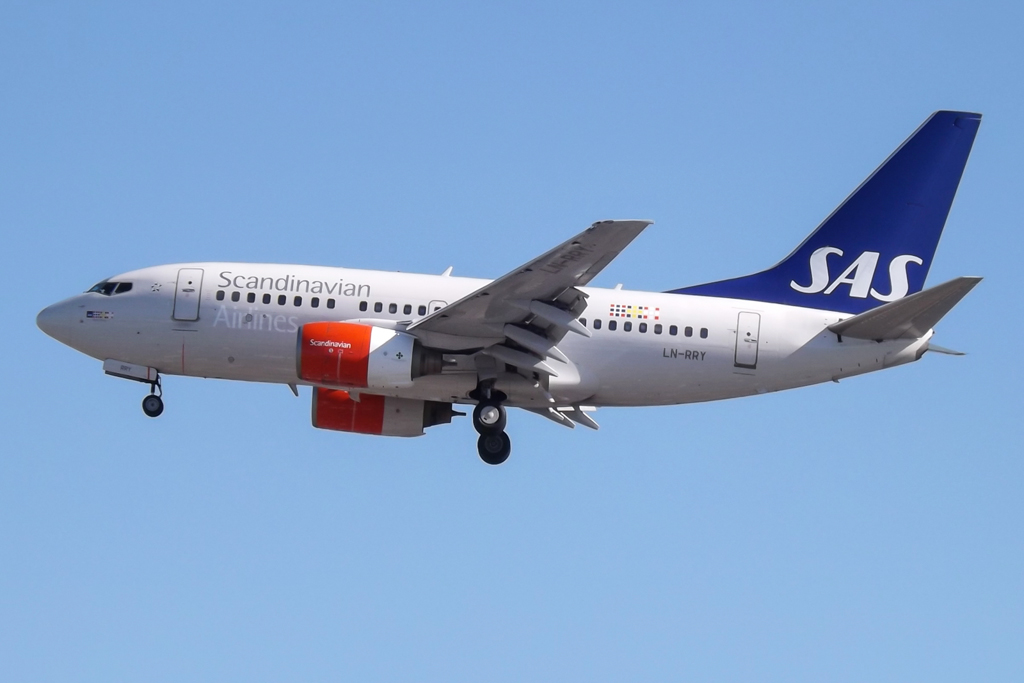 LN-RRY Boeing 737-600 SAS